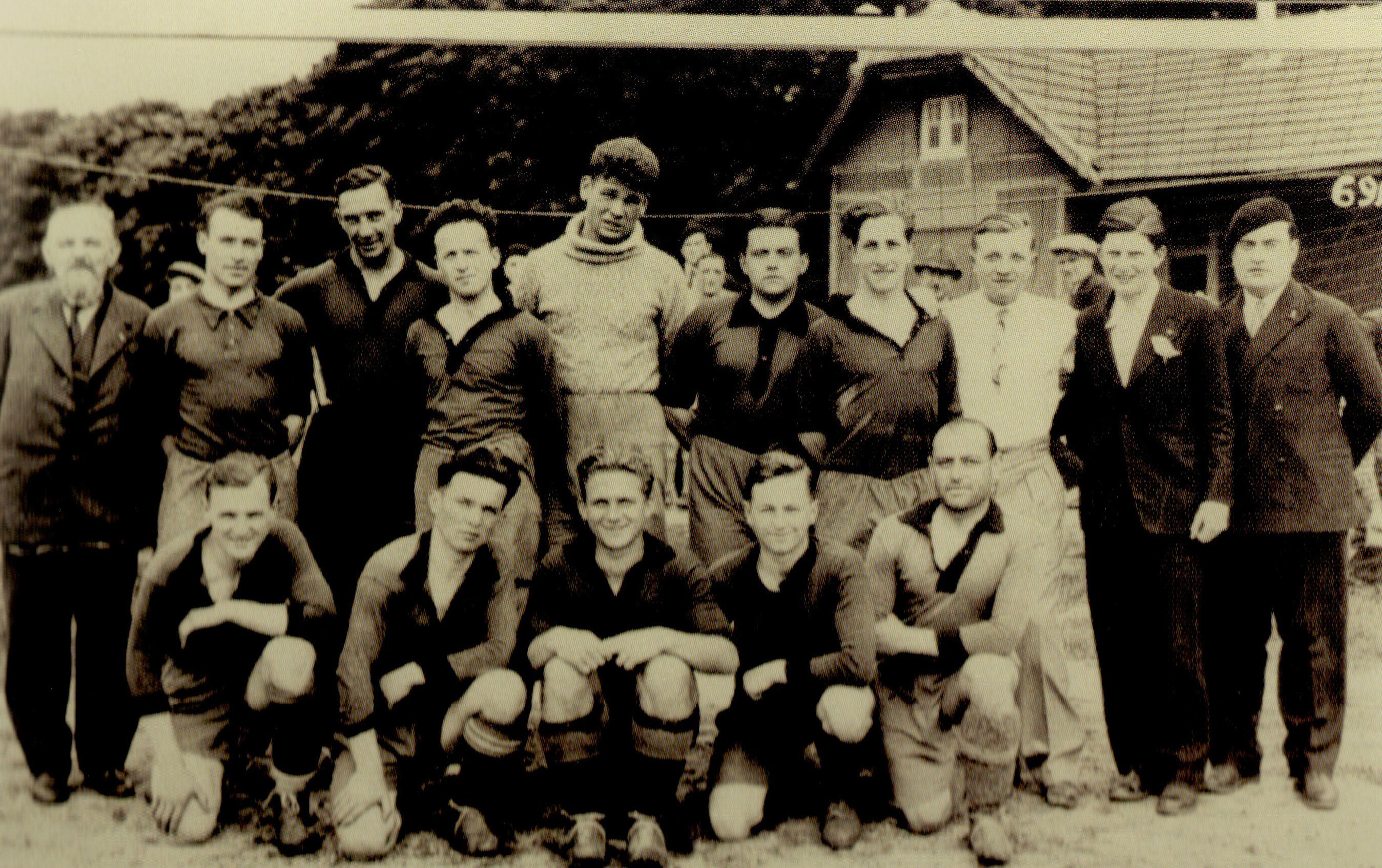 Équipe de Rennes lors de la finale du championnat de France universitaire, gagnée contre Montpellier (4-0) en 1931. Debout, de gauche à droite : Pichon père, Félix Le Gentil, Adolphe Touffait, Lintanf, Bohumil Klenovec, Lemonnier, Charles Darris, X, Henri Fournis, X. Accroupis, de gauche à droite : Pichon fils, Burel, Walter Kaiser, Thépot et Siméon Belliard. Tous les joueurs sont licenciés au Stade rennais, sauf Lintanf, Pichon fils, Burel et Thépot.